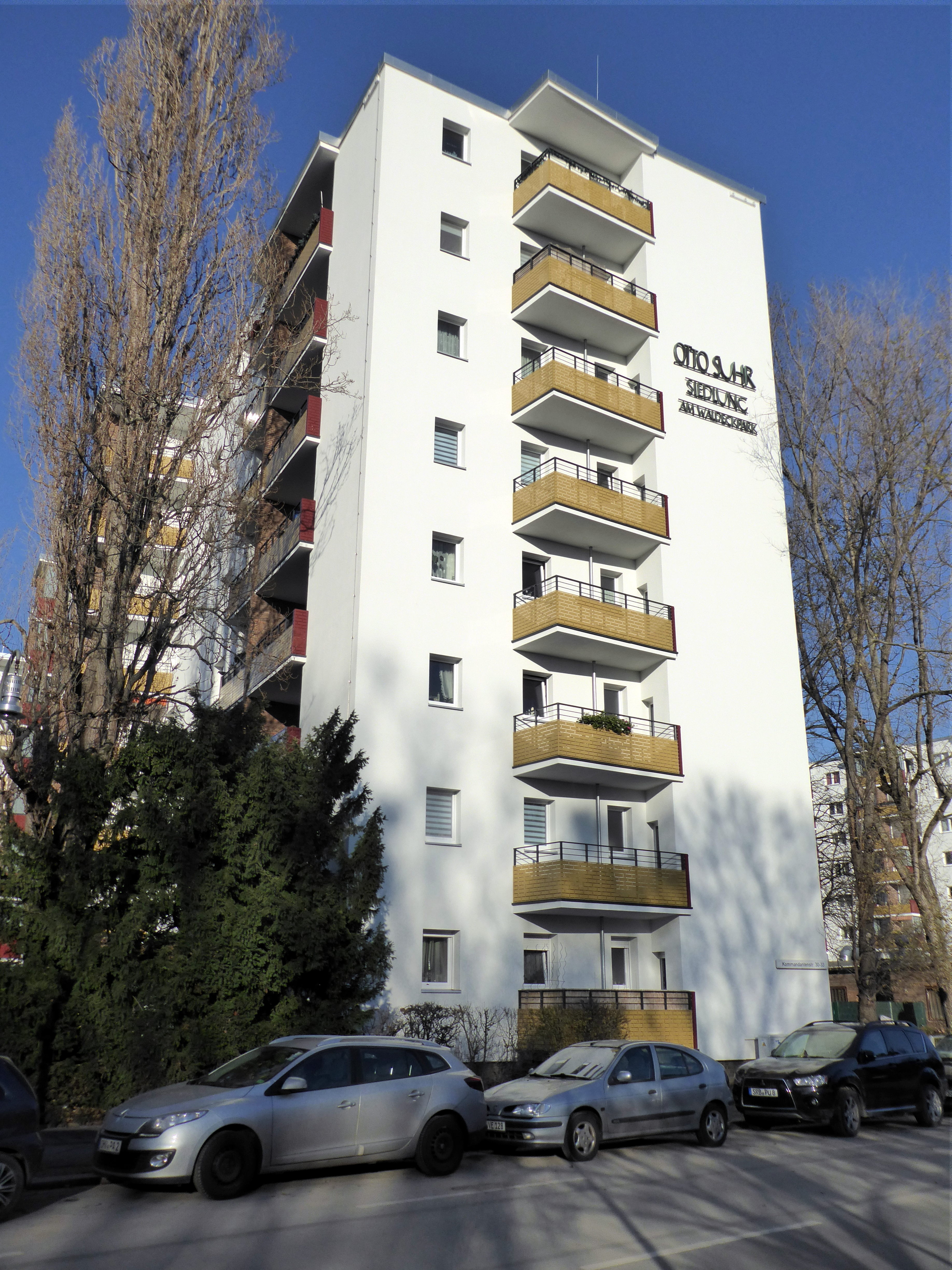 Berlin-Kreuzberg Alexandrinenstraße Otto-Suhr-Siedlung